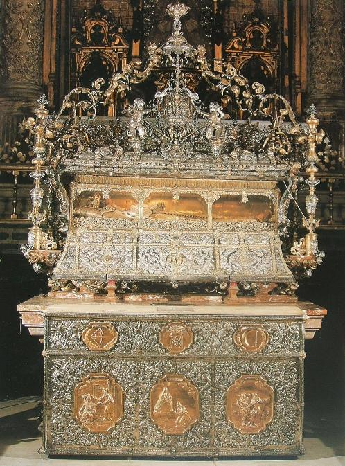 La urna barroca de plata en la que descansa el cuerpo incorrupto del rey Fernando III el Santo se halla en la Capilla Real de la catedral de Sevilla y es considerada la obra cumbre de la orfebrería barroca española. Fue realizada por el orfebre gaditano Juan Laureano de Pina entre 1690 y 1719, y de este mismo autor también se conservan otras obras en la catedral hispalense.